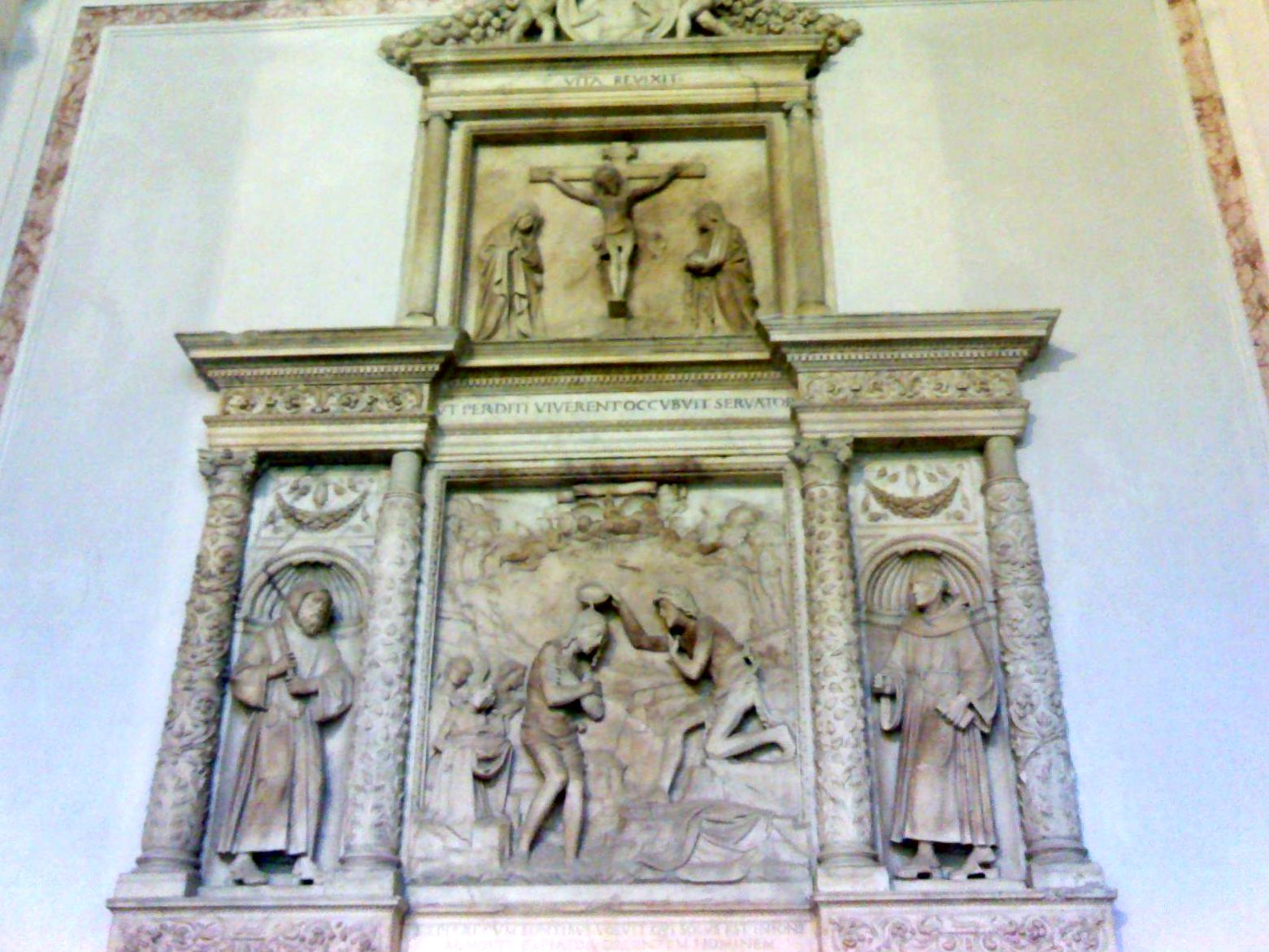 Chiesa di San Giovanni Maggiore di Napoli - Opera di Giovanni da Nola nella cappella Ravaschieri